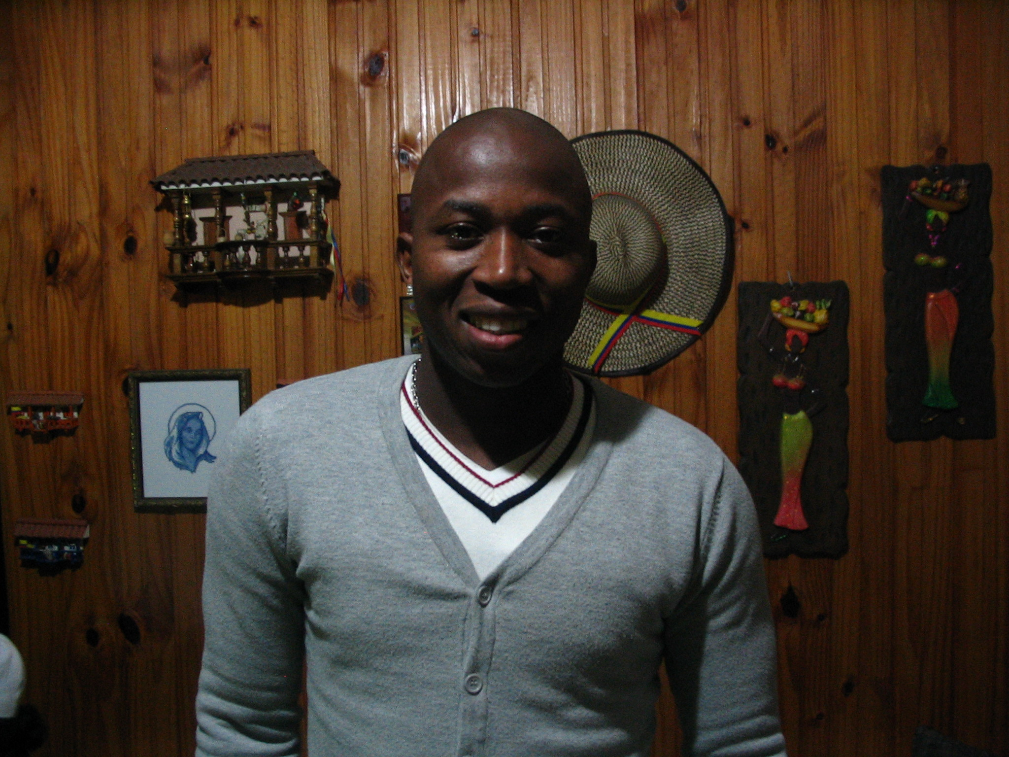 Foto de Miguel Murillo tomada en Montevideo, Uruguay